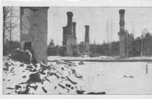 Музей: Баранавіцкі краязнаўчы музей Тып: выяўленчыя крыніцы Від: графіка прыкладная Група: Віды горада Прадметнае імя: фотапаштоўка Назва/аўтарская назва: "Uberrestn vom ehemaligen russichen Hauptkuartier in Baranowitschi" Калектыўныя аўтары: Druck: "Deutsche Kriegs Zeitung von Baranowitschi"; (Выданне "Нямецкая вайсковая газета ў Баранавічах"); Матэрыялы: фотапапера; Тэхналогіі стварэння: фотадрук чорна-белы; Дата стварэння: 1916 г. Месца стварэння: Расійская Імперыя (?), Баранавічы (?) Памеры: 9,2 х 13,58 см